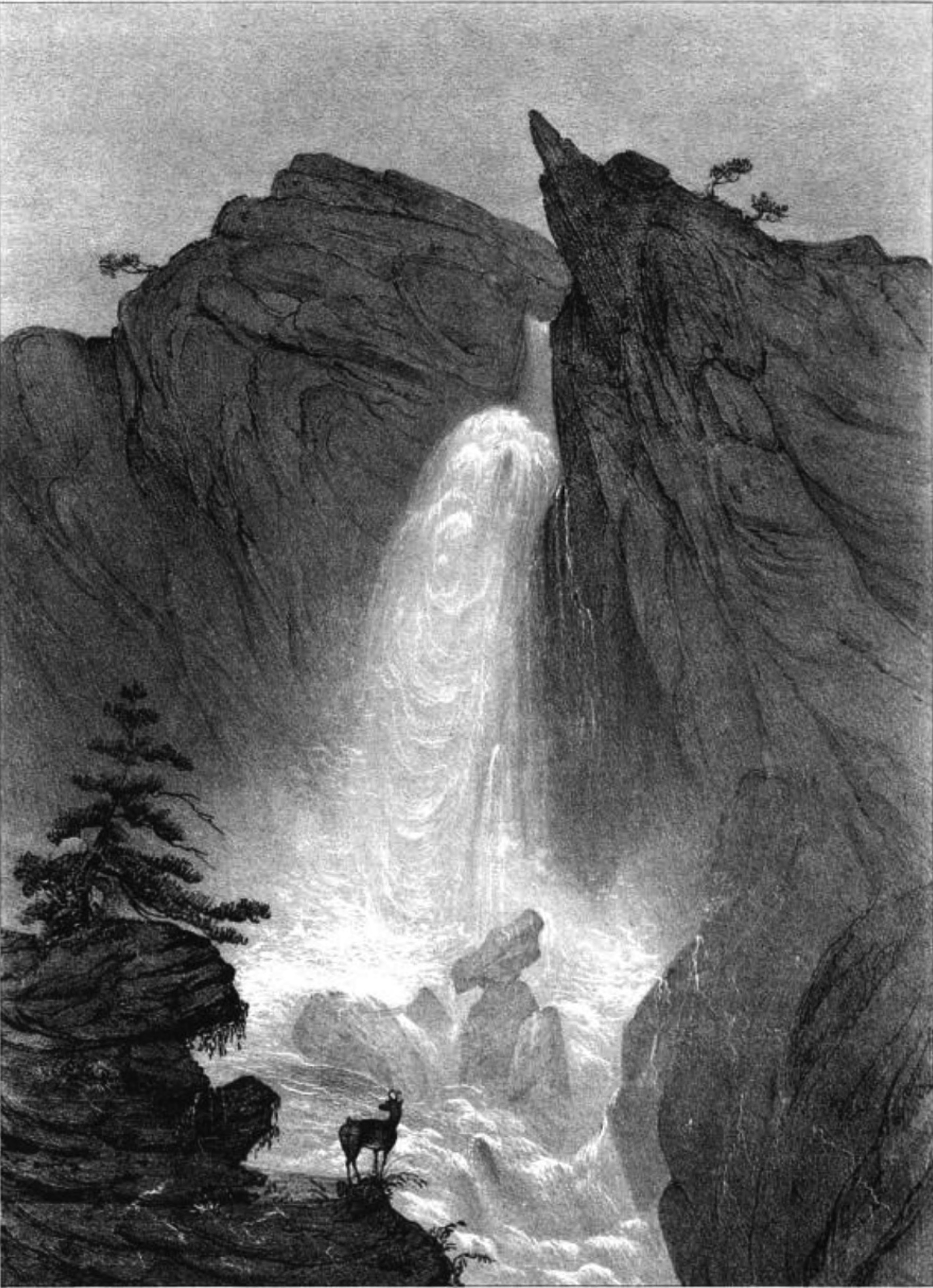 Album du Dauphiné - tome III, litographie de la Cascade du Saut de la Pucelle, Les Fréaux, La Grave, Hautes-Alpes, France.